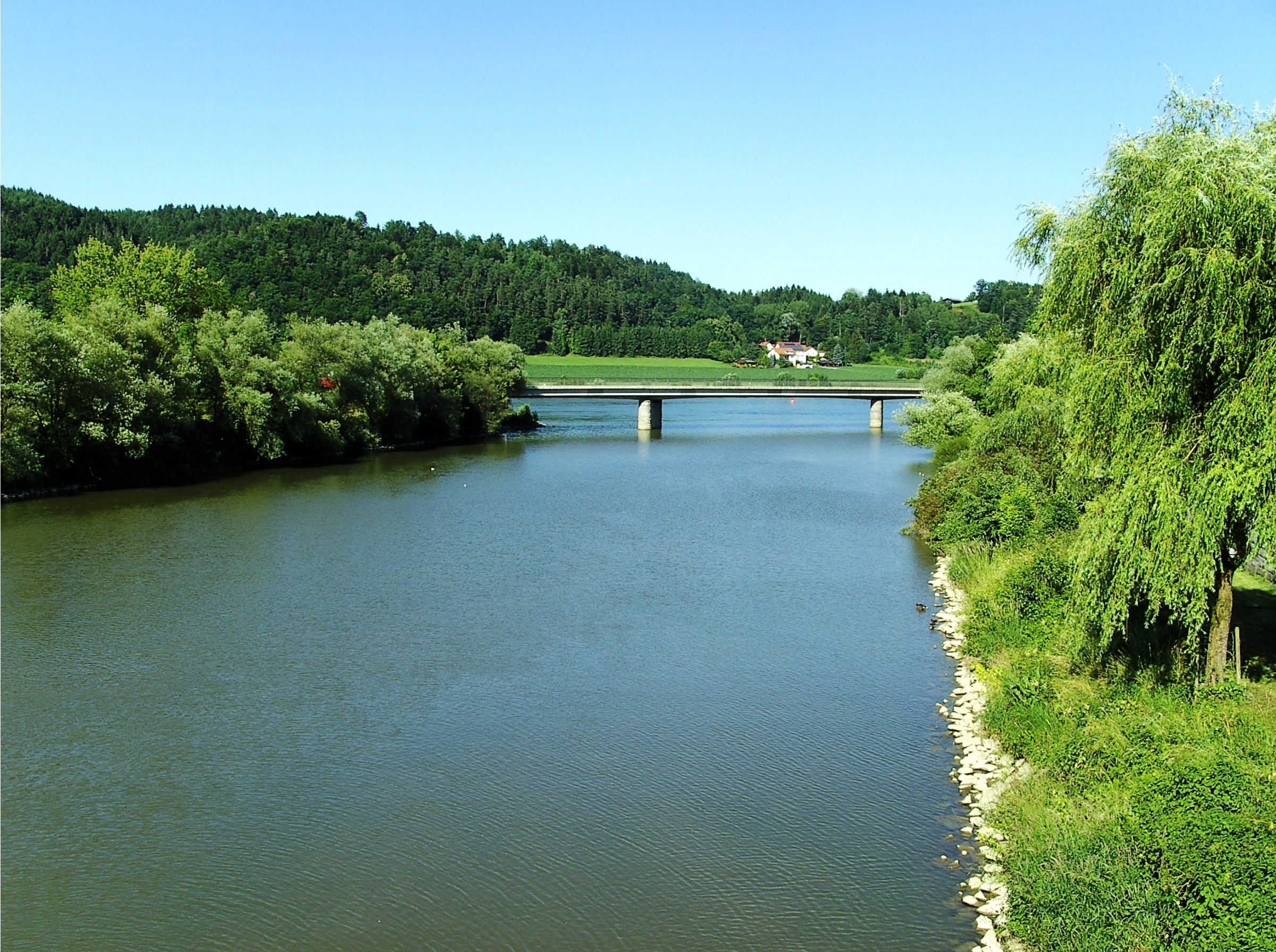 Die Vils mündet in Vilshofen an die Donau in den Fluss Donau. Auf der Brücke verläuft die Bundesstraße 8.